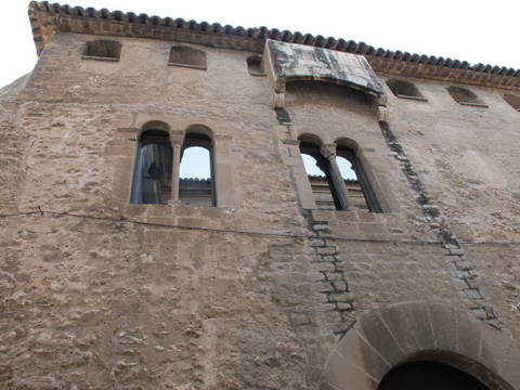 castell de la Geltru - Vilanova i la Getrú